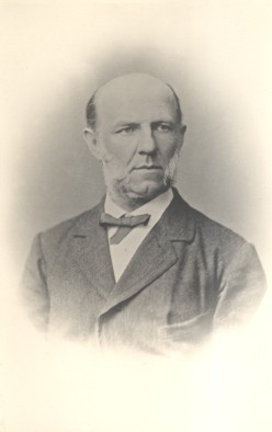 Gustav Moritz Constantin von Engelhardt